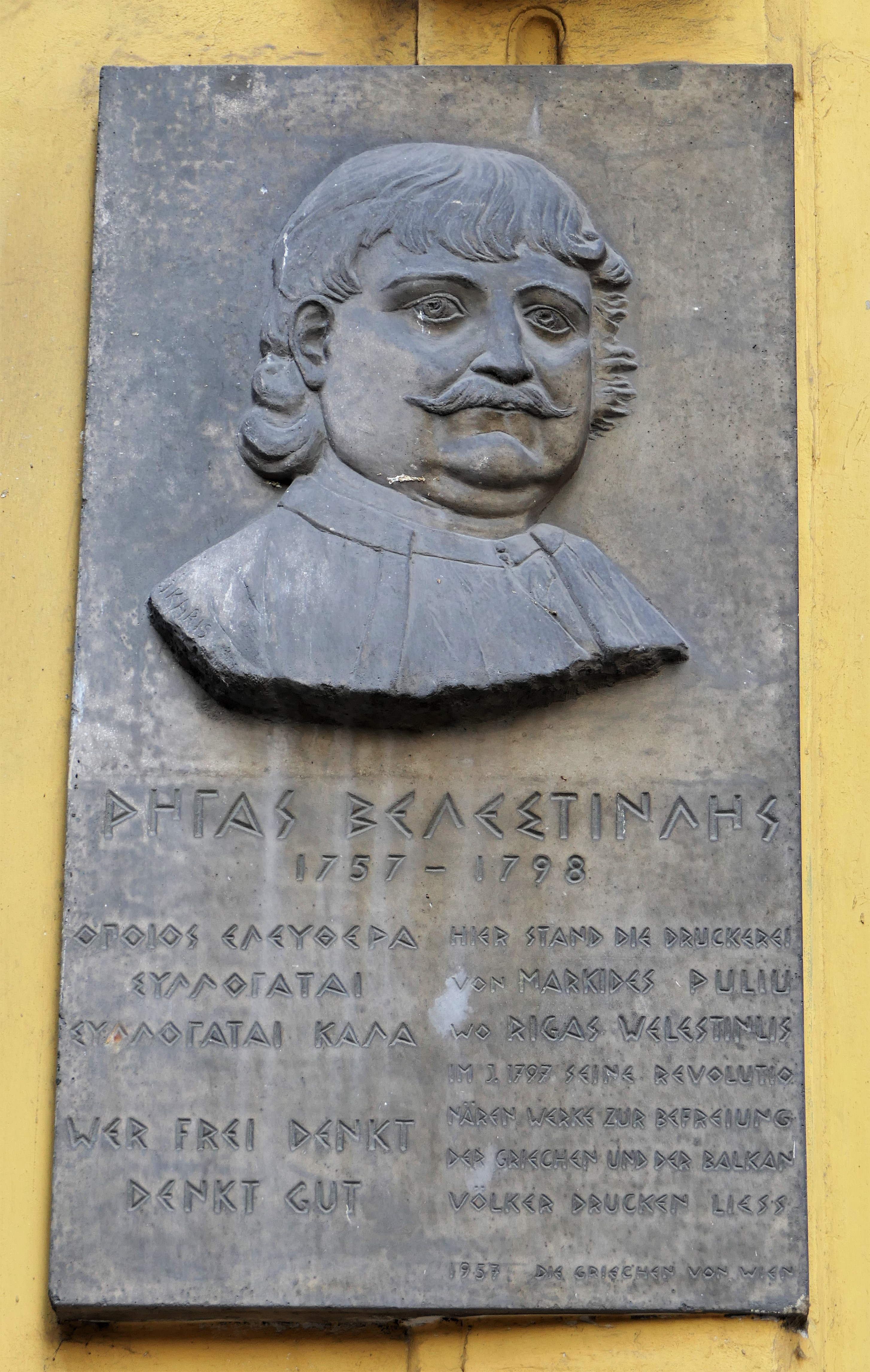 Rigas Velestinlis-Gedenktafel in Wien, Rotenturmstraße 21 / Inschrift: Rigas Welestinlis, 1757 - 1798 / Hier stand die Druckerei von Markides Puliu wo Rigas Welestinlis im Jahre 1797 seine revolutionären Werke zur Befreiung der Griechen und der Balkan-Völker drucken ließ. Wer frei denkt, denkt gut, 1957 Die Griechen von Wien